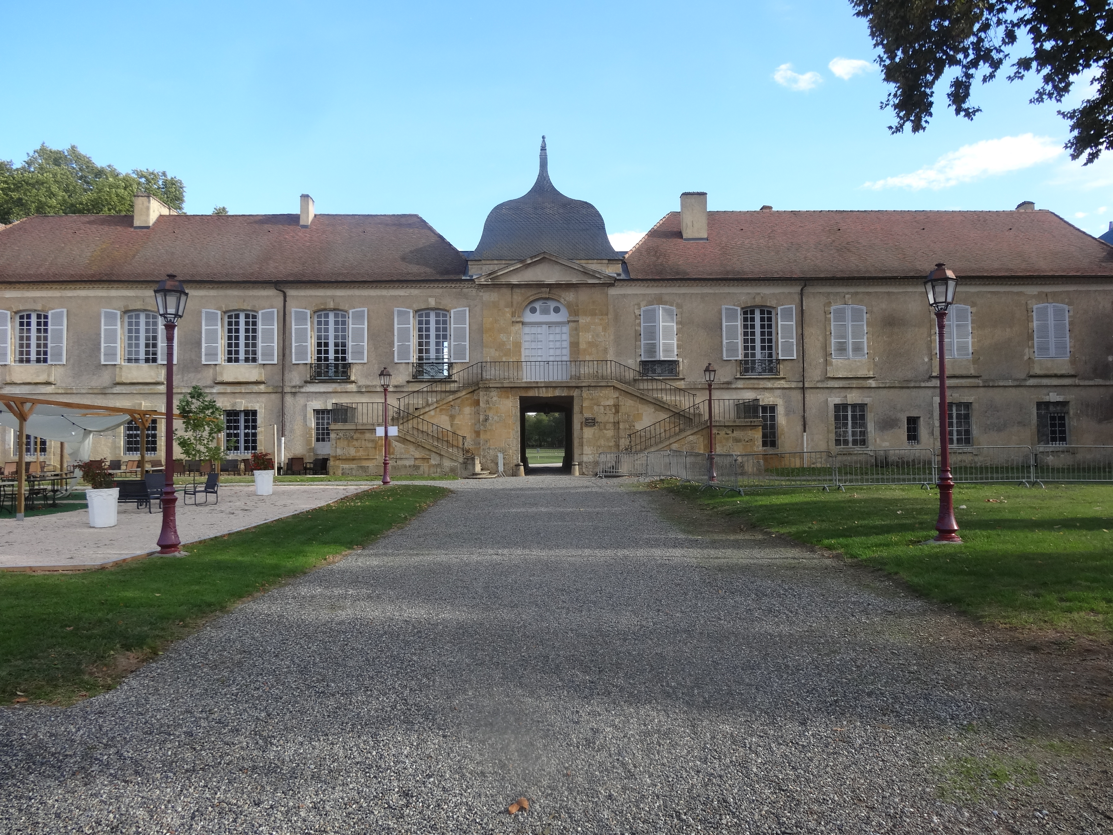 Façade nord du château de L'Isle-de-Noé. .